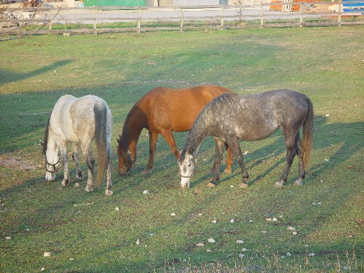 Lovaglásra tartott lovak (Magyarország)